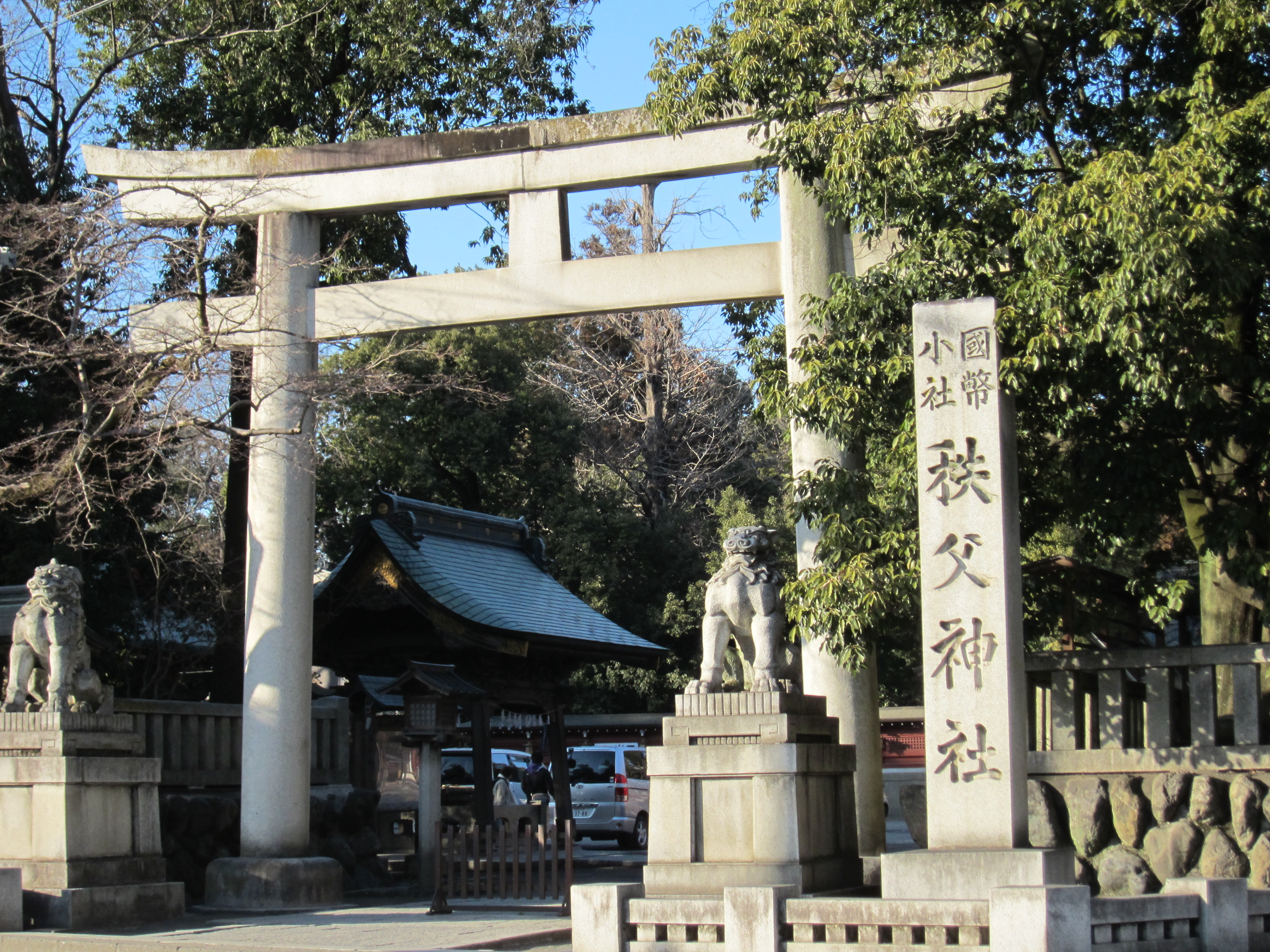 埼玉県秩父市 秩父神社 鳥居